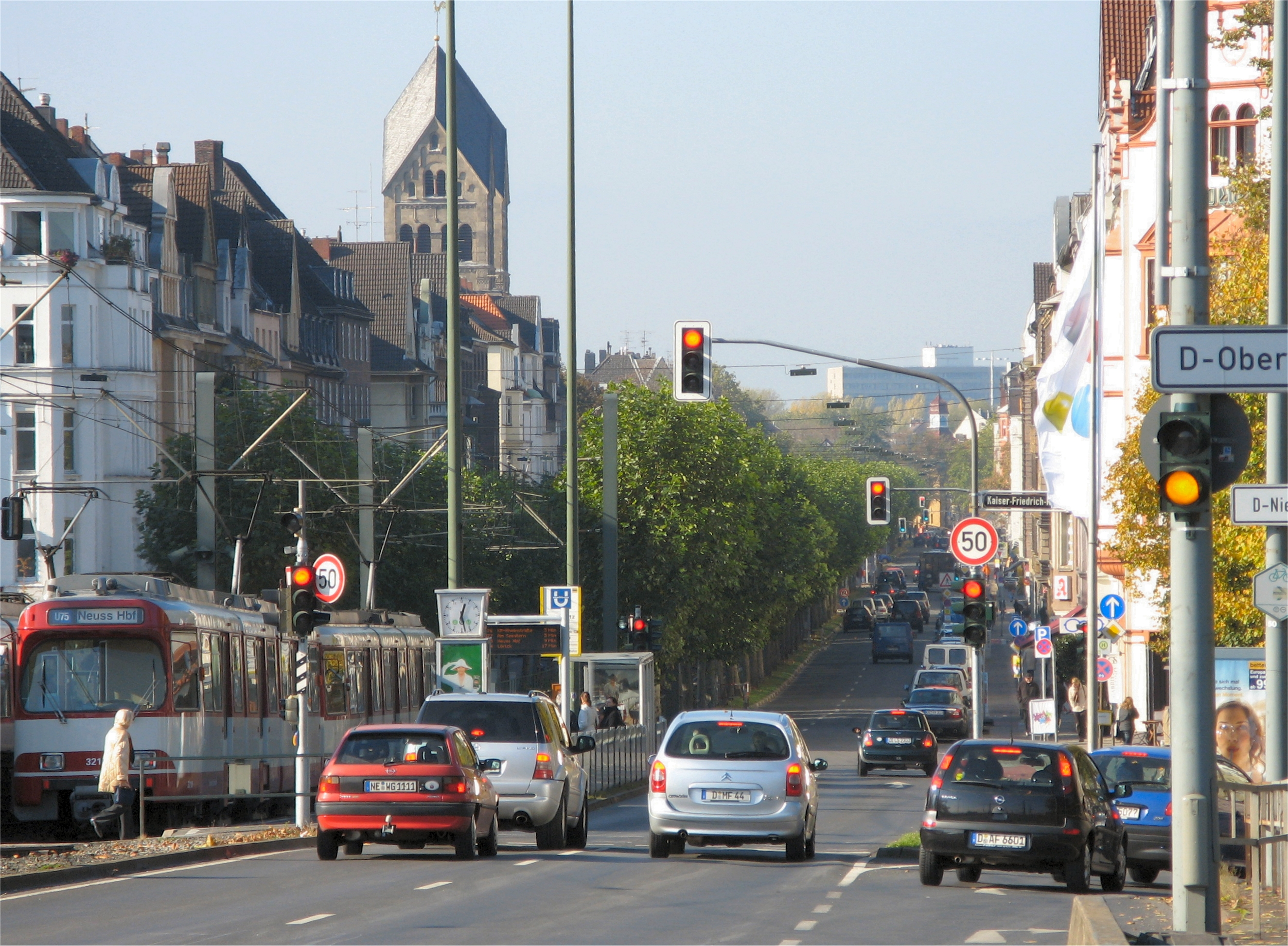 Luegallee in Düsseldorf-Oberkassel in Höhe Rheinbahn Stop Luegplatz